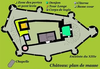 Titre: Château de Calmont d'olt plan de masse Source: plan de Thierry Plume de Saint Côme d'Olt (avec son autorisation) Licences: CC